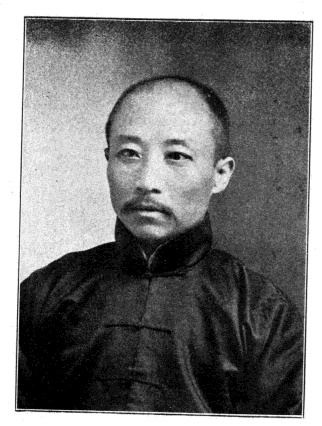 中文（台灣）: 中華民國國會議員